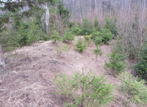 Dijokalnis